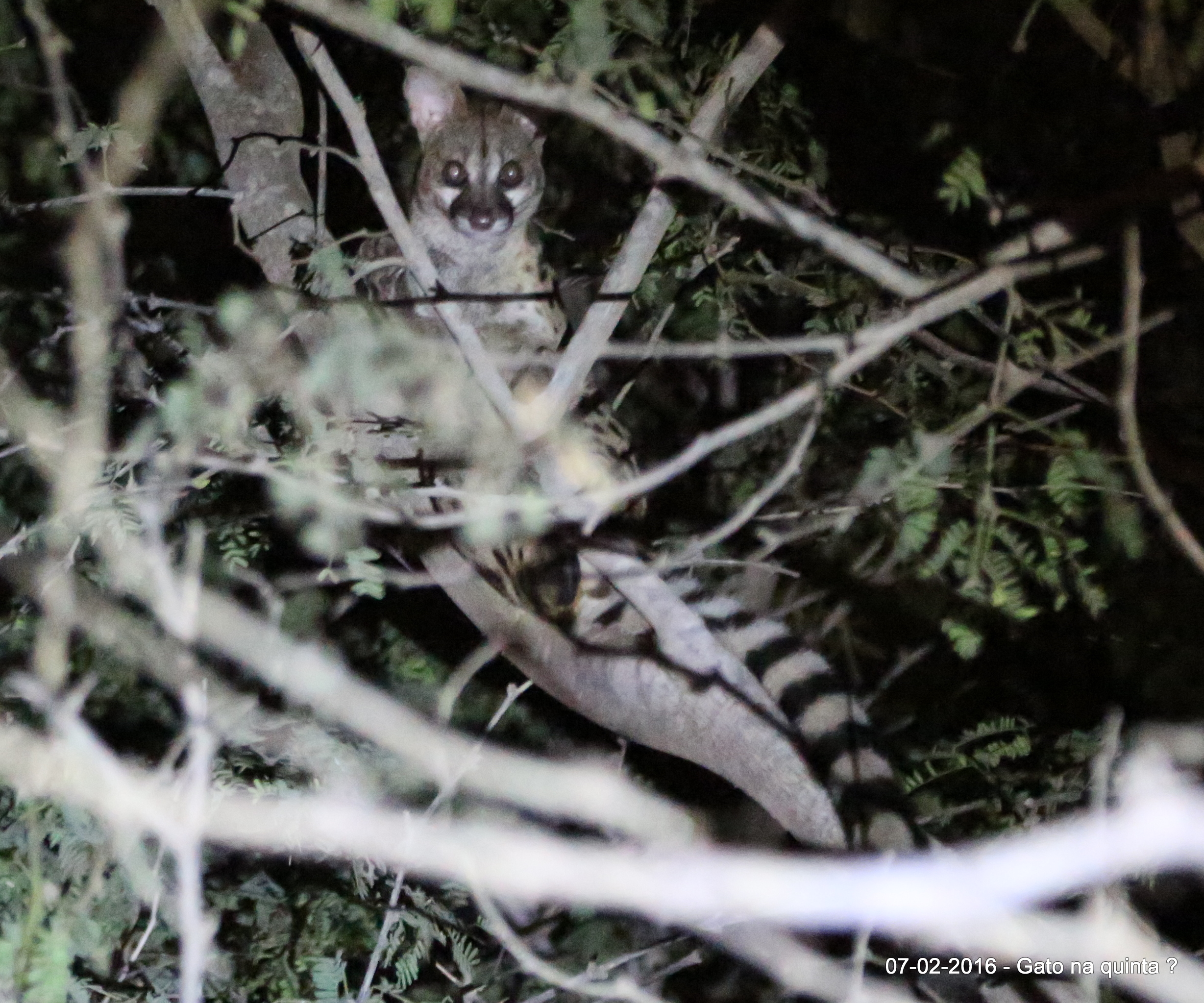 Fotos tirada em Luanda - Benfica a 20km a sul da Capital de Angola